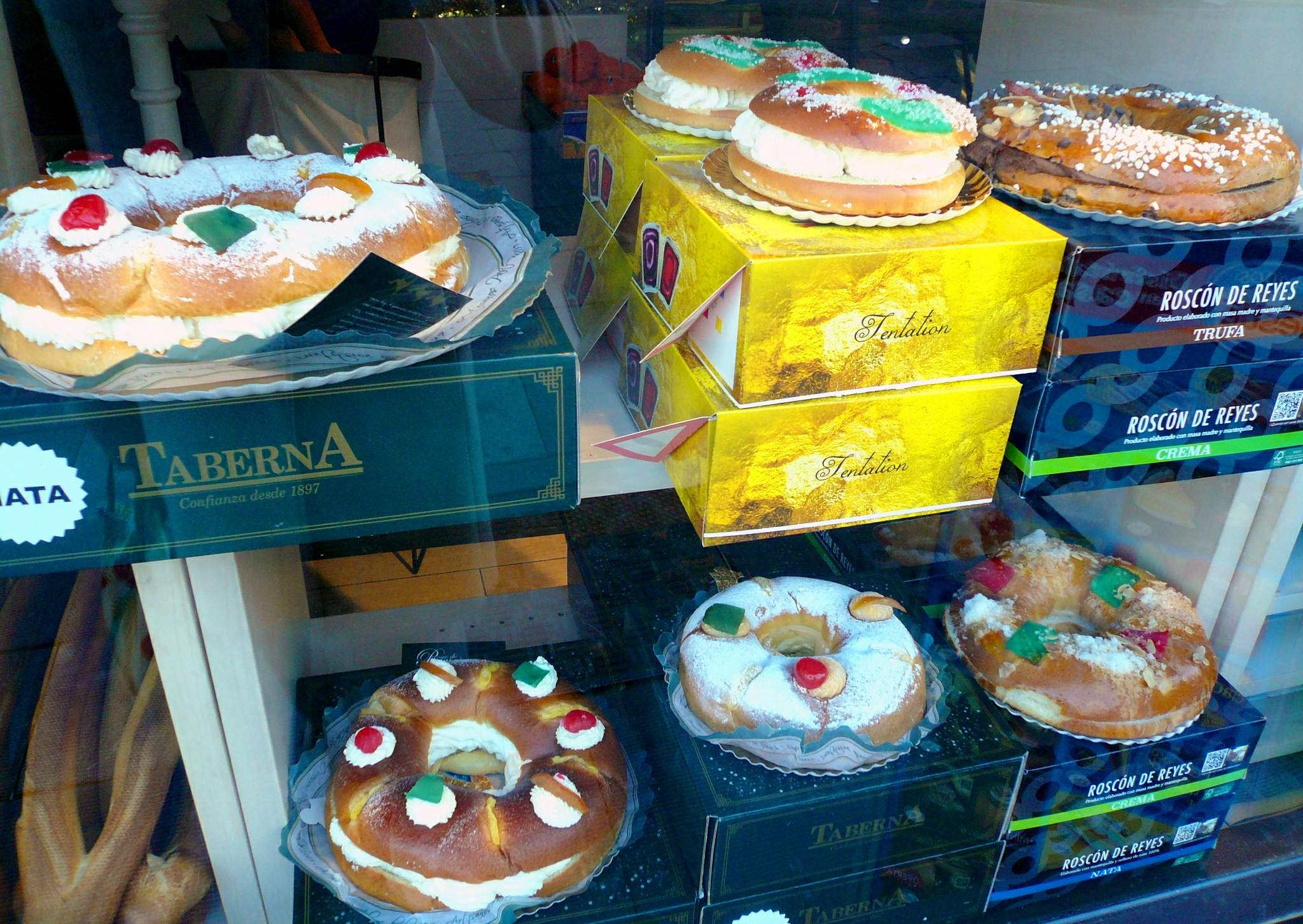 Roscones de Reyes (Vitoria)